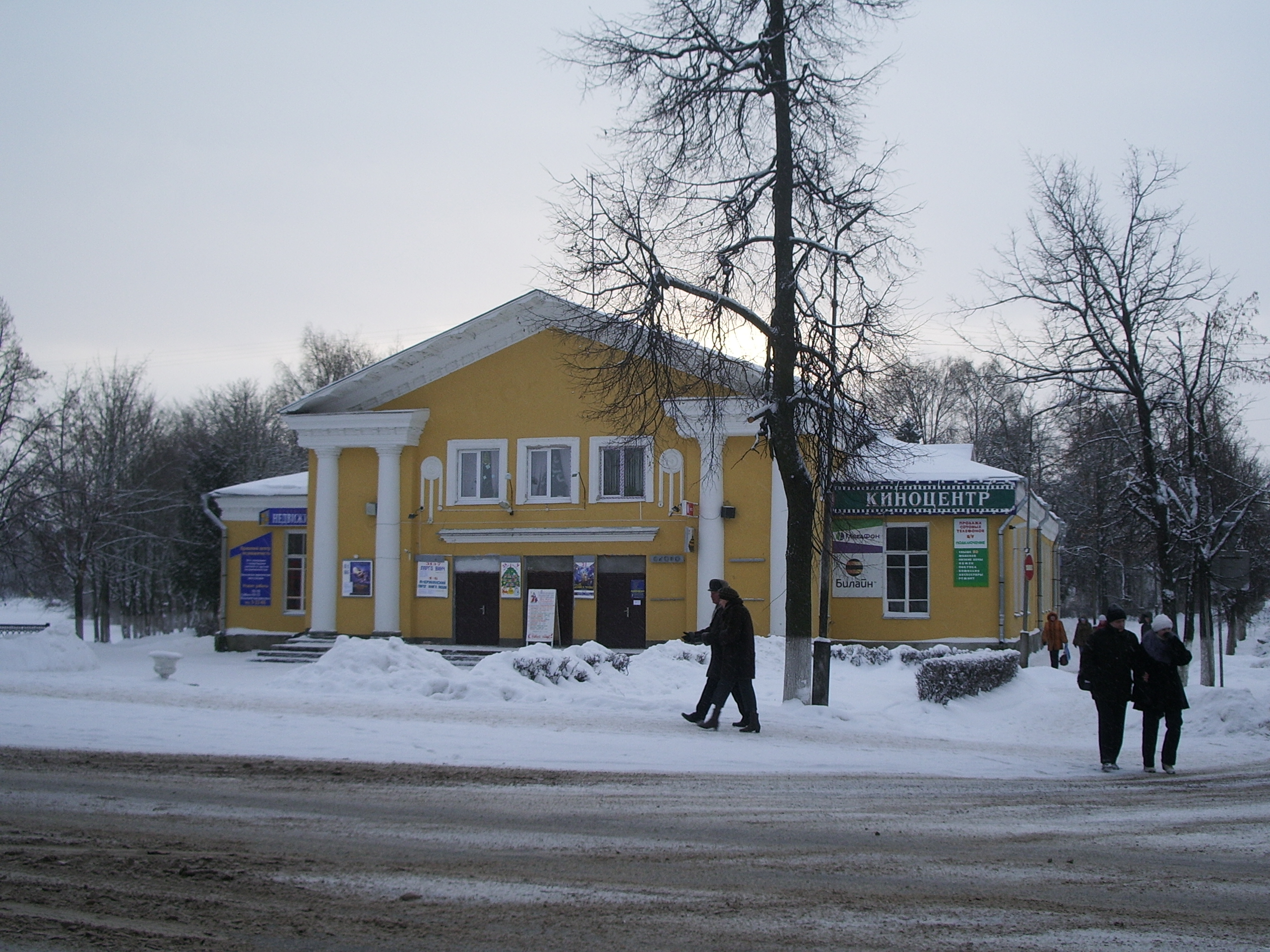 Киноцентр в Старой Руссе (Новгородская область)